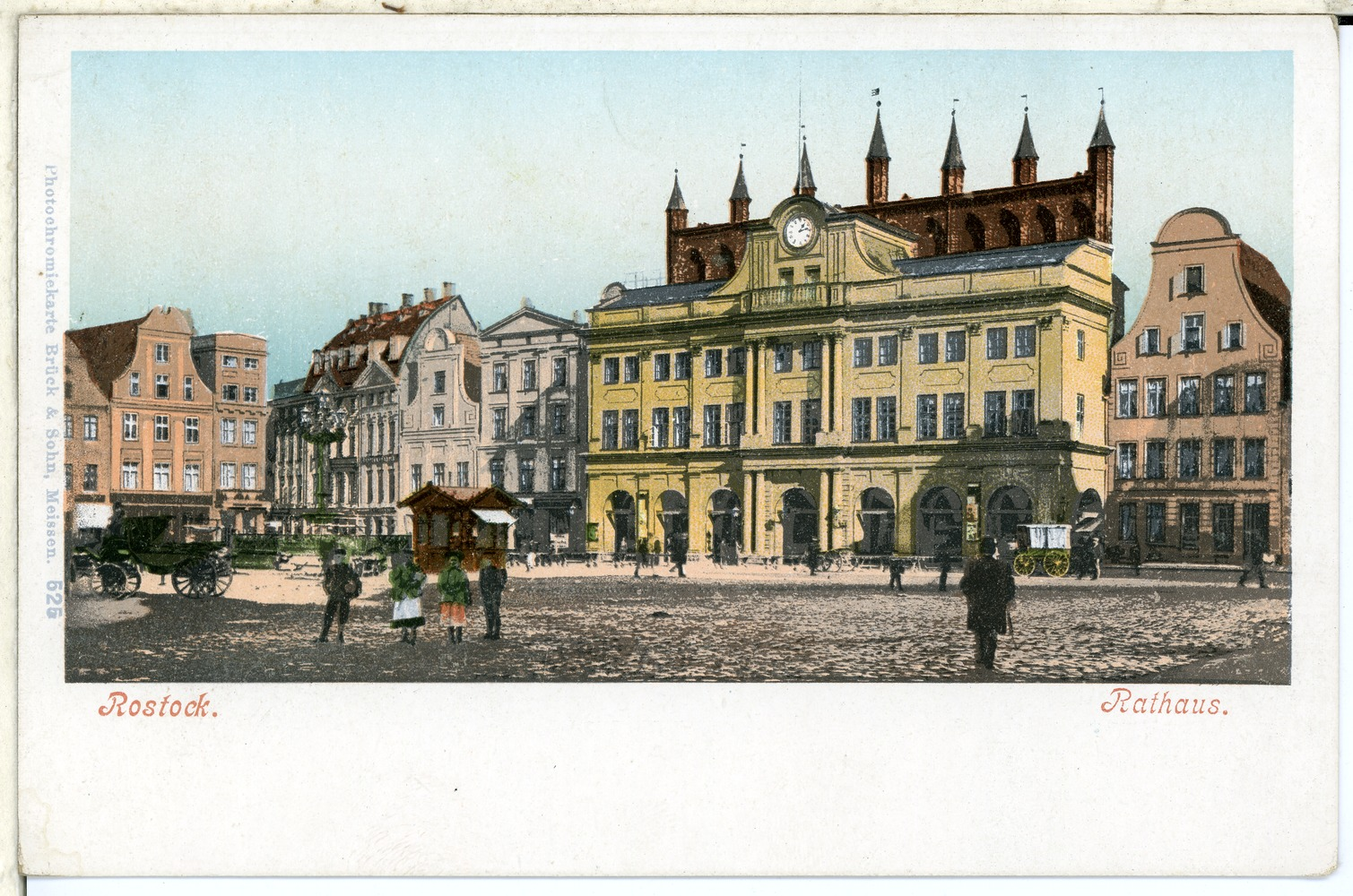 Rostock; Rathaus This postcard is from publisher Brück & Sohn in Meißen ( postcard has a unique number 00525 and is available in a higher resolution at the publisher. This images was uploaded in a cooperation project between Wikipedians and the publisher.